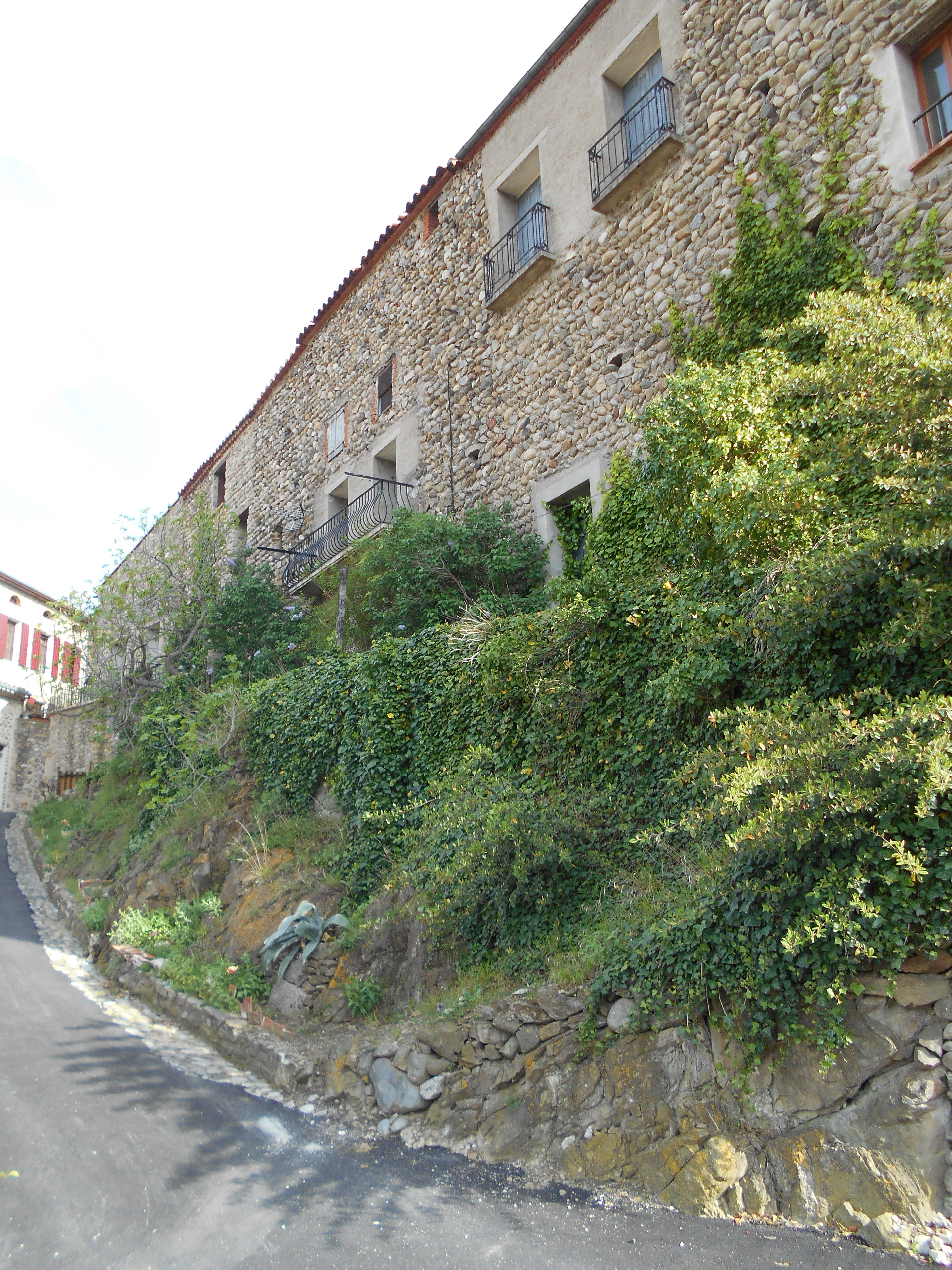 Les muralles de Marqueixanes